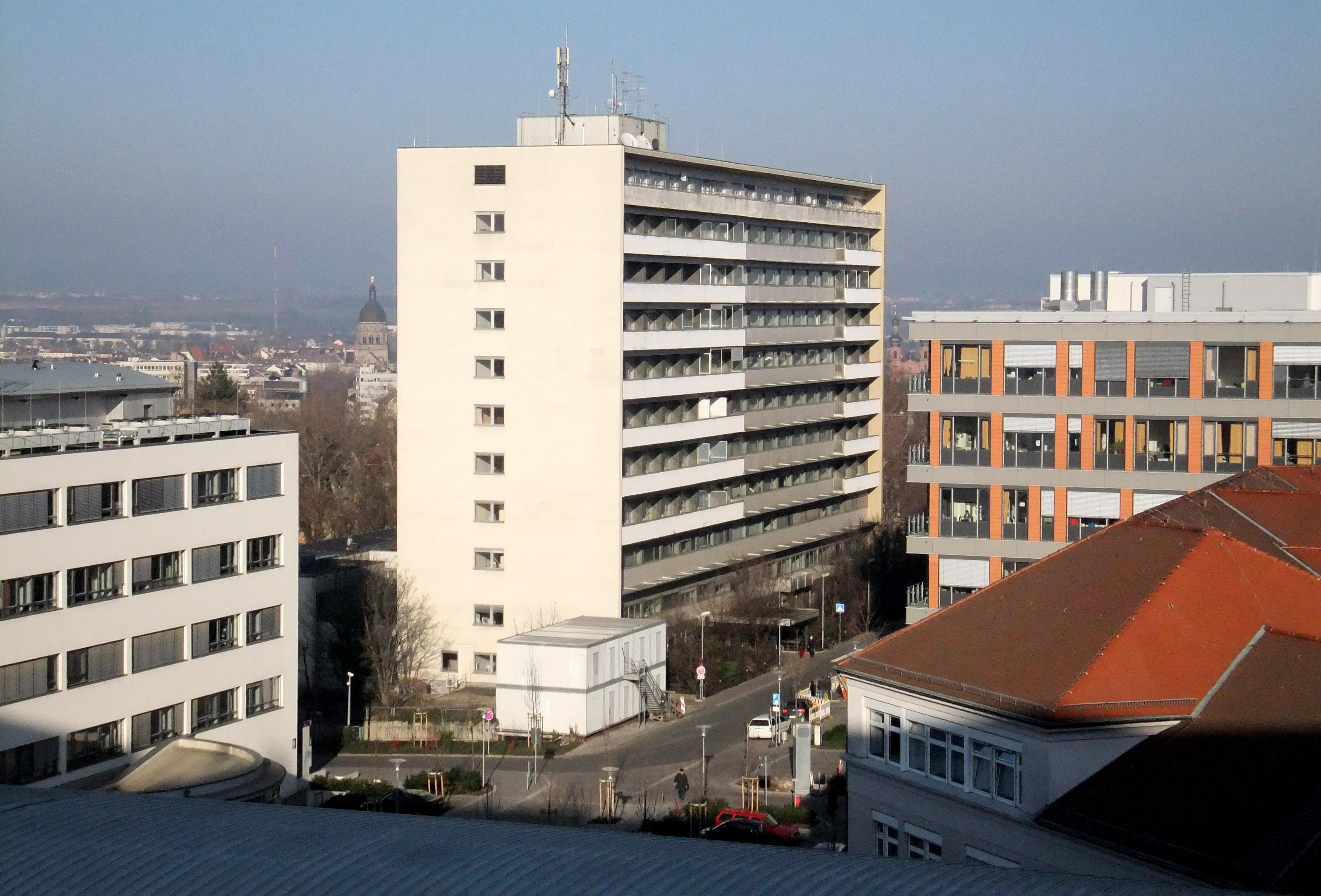 Die Nachsorgeklinik im Gebäude 701 auf dem Gelände der Universitätsmedizin der Johannes Gutenberg-Universität Mainz mit der Klinik und Poliklinik für Neurologie und der II. Medizinischen Klinik und Poliklinik für Angiologie in Mainz (Rheinland-Pfalz) in Deutschland